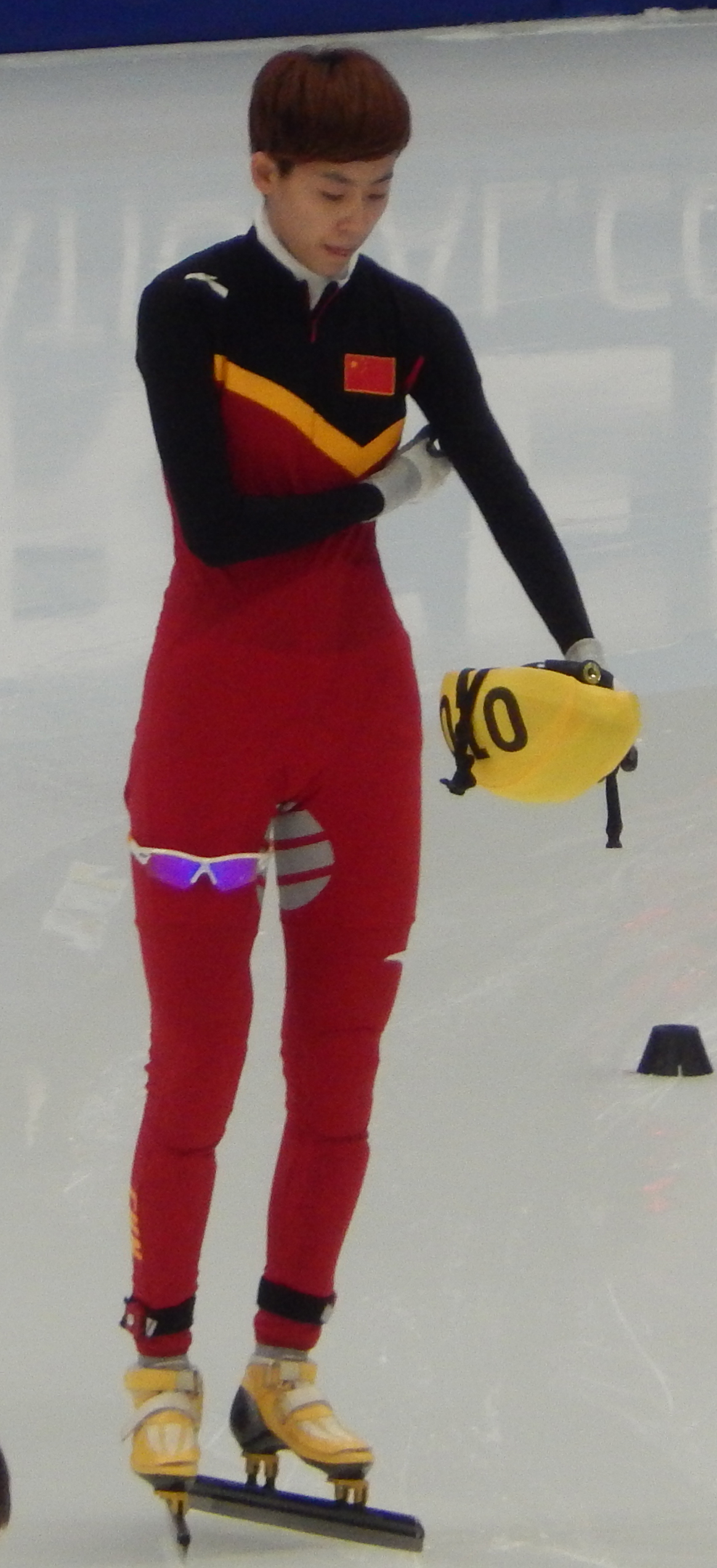 Фань Кэсинь на чемпионате мира 2015